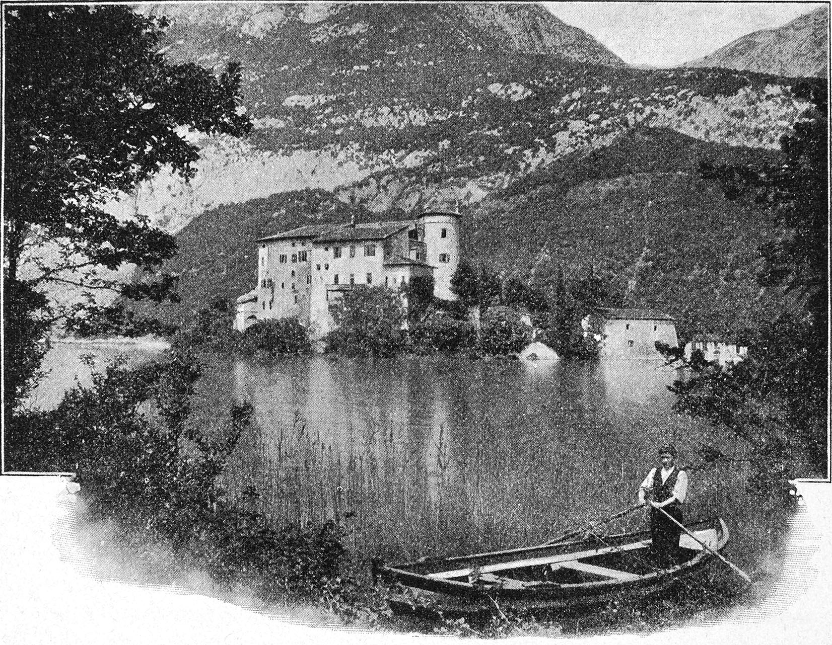 Immagini da Il Trentino, cenni geografici, storici, economici, 1915, Cesare Battisti, 1915